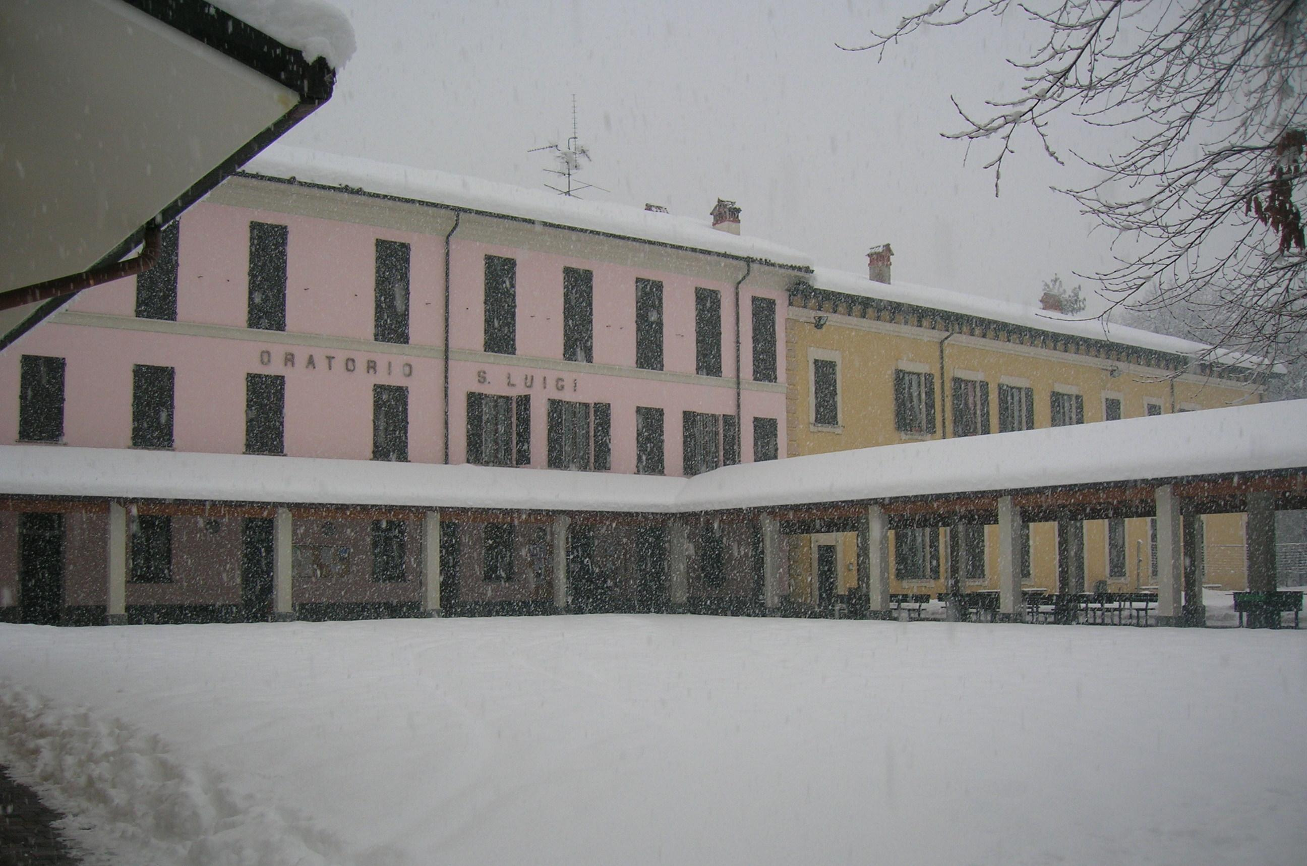 L'Oratorio San Luigi a Cinisello, durante la grande nevicata del gennaio 2006.